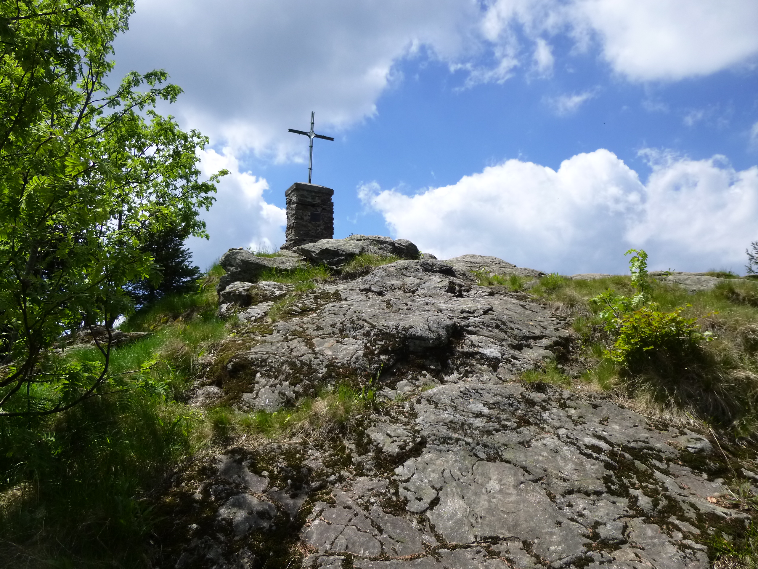 Gipfelkreuz am Großen Falkenstein im Nationalpark Bayerischer Wald.